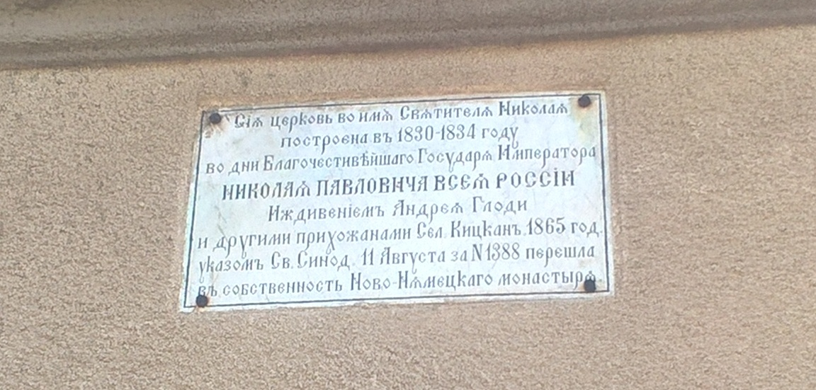 Płyta erekcyjna na cerkwi św. Mikołaja w monasterze Nowy Neamț